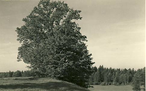 Ilumäe hiiepärn